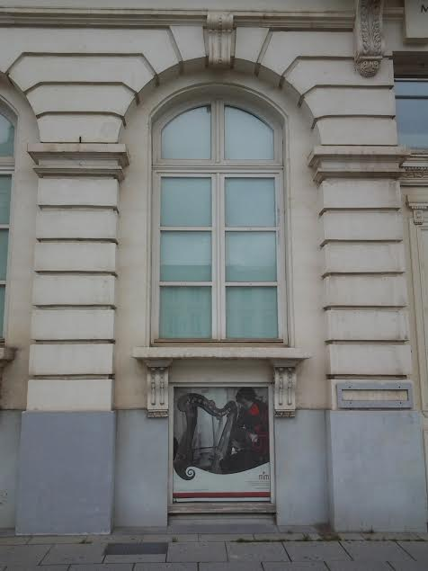 Arcade cintrée et fenêtre surbaissée au rez-de-chaussée